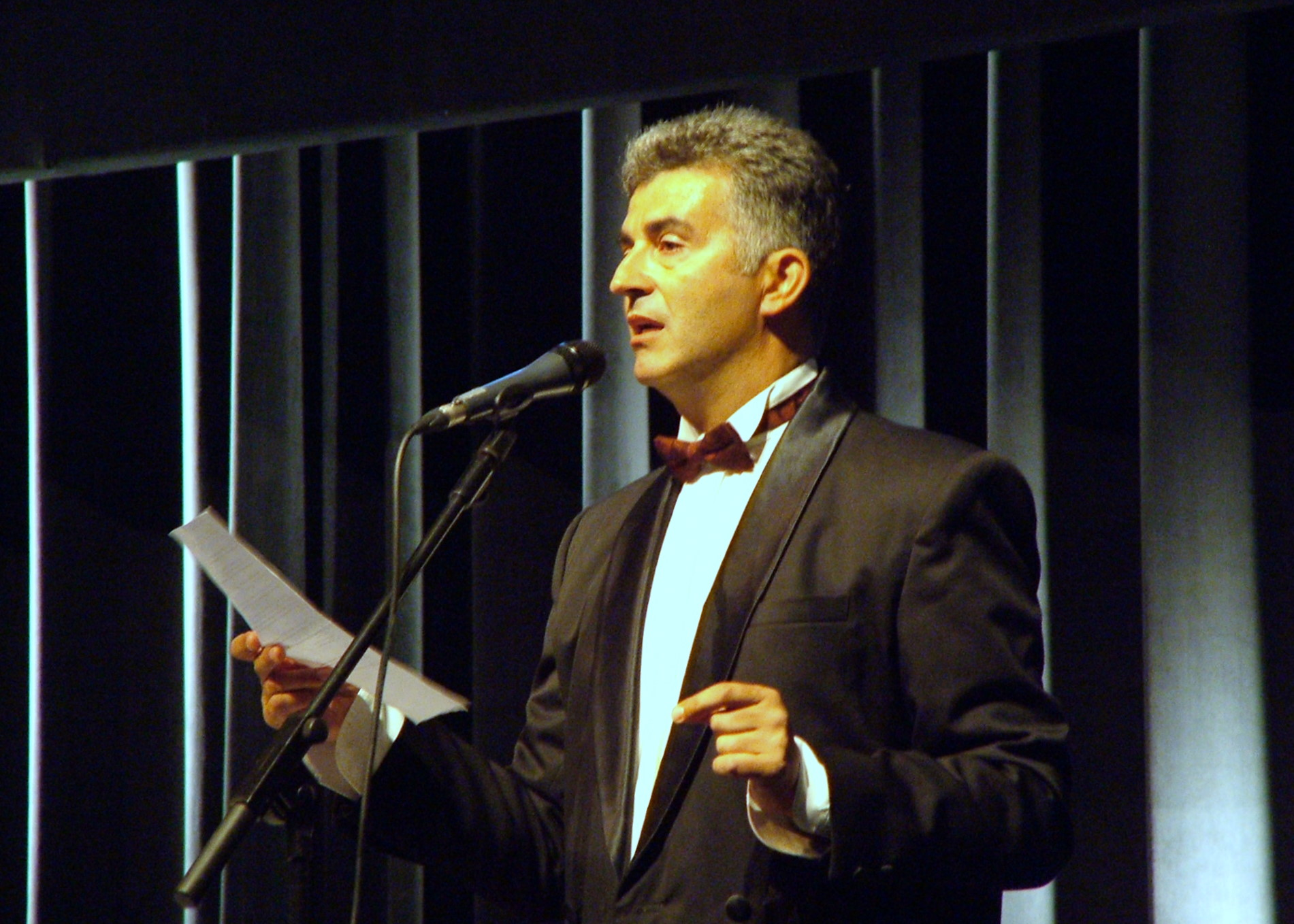 Universala Kongreso de Esperanto, Roterdamo 2008. Kabaredo kun Sasxa Pilipovicx.